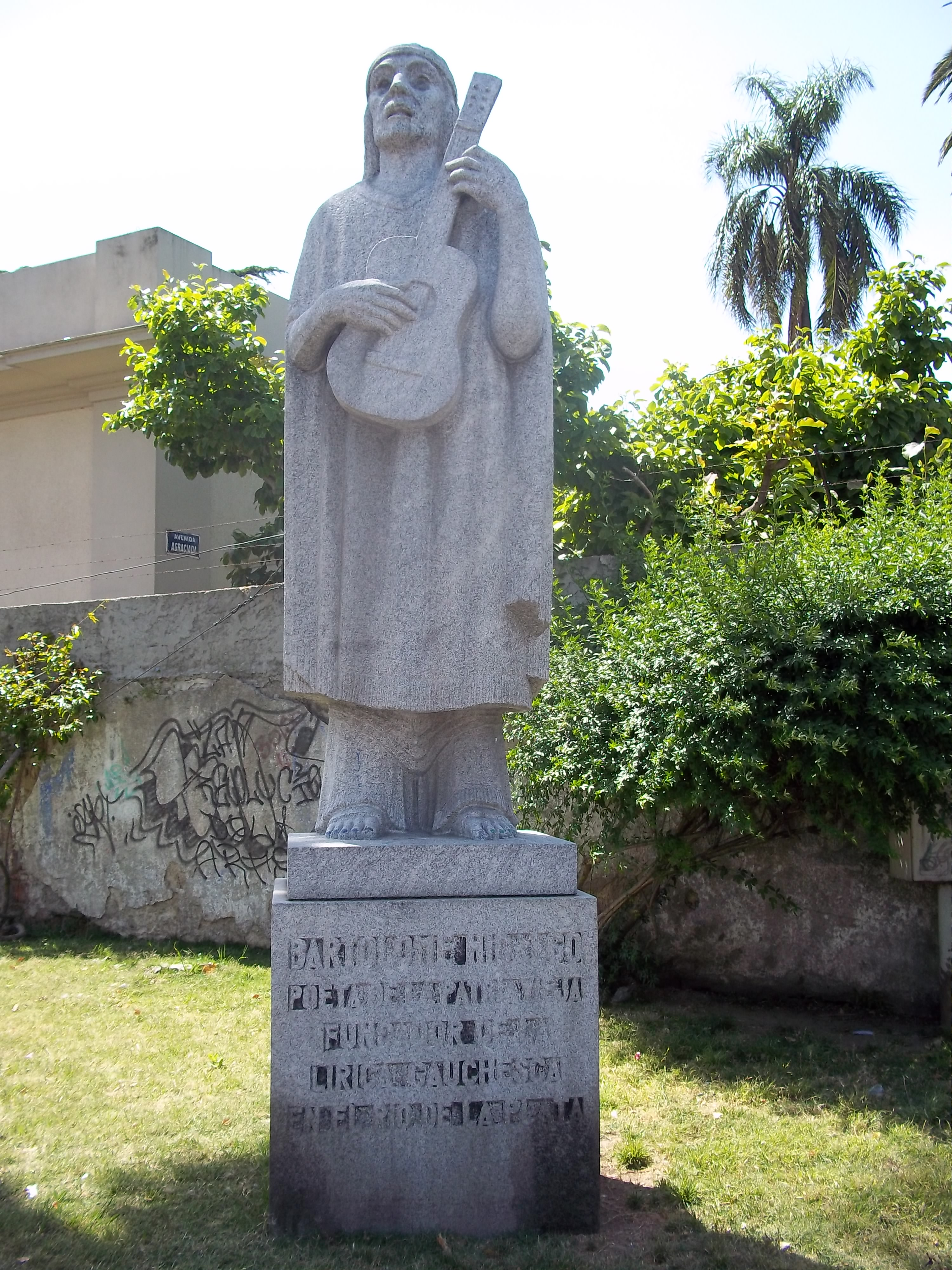 Monumento a Bartolomé Hidalgo, "Cantor de la Patria", ubicado en el Pasaje Hermanos Ruiz esquina Avda. Agraciada (Montevideo, Uruguay). Es una estatua en granito gris creada por Ramón Bauzá.